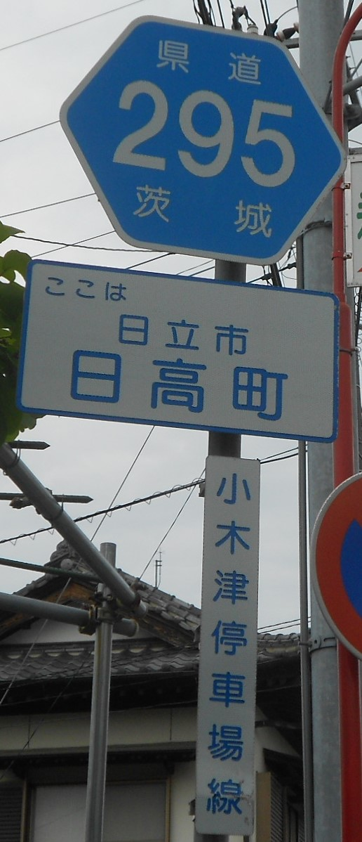 茨城県道295号線の標識。 茨城県道ではこのような標識が使われている。